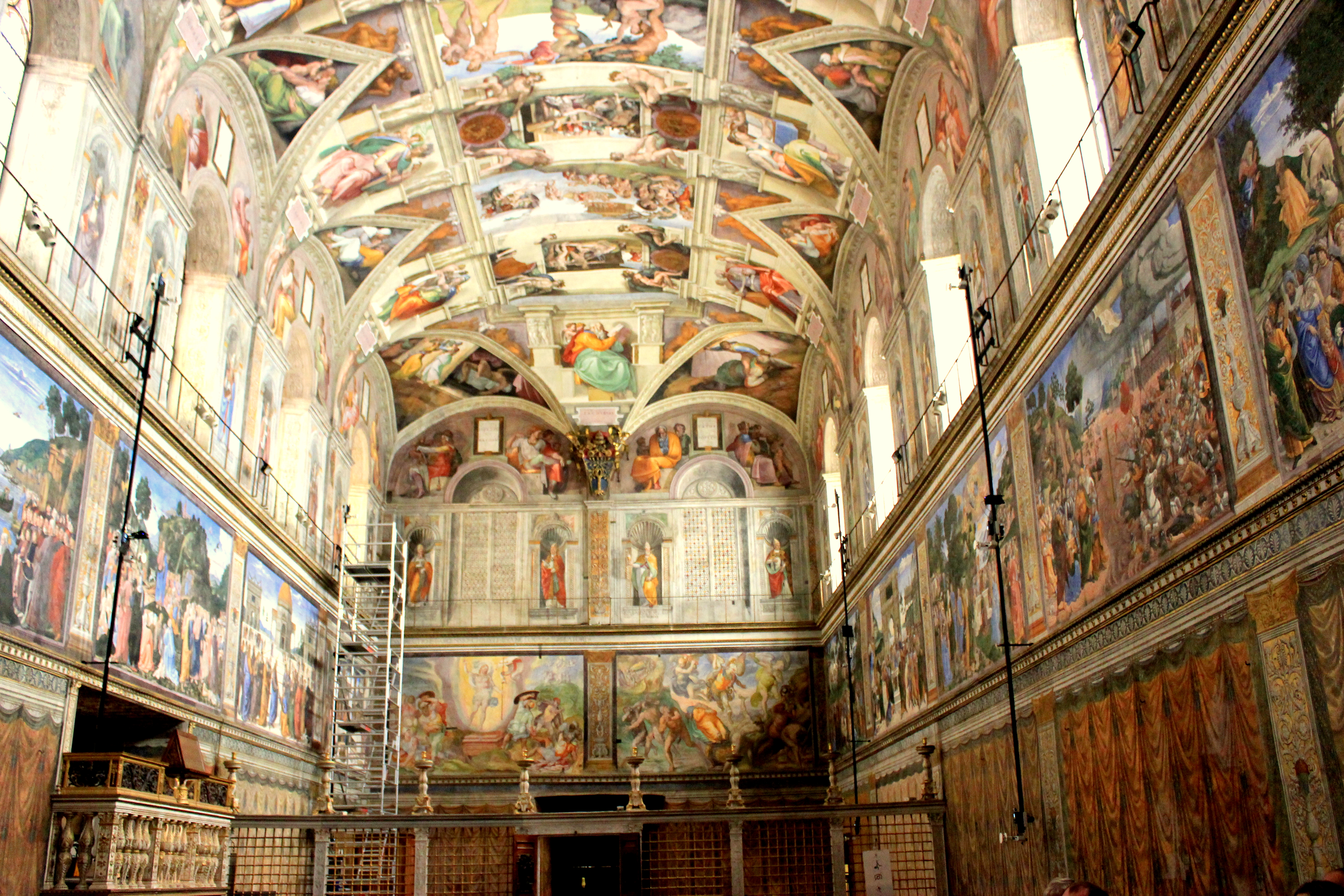 Capilla Sixtina